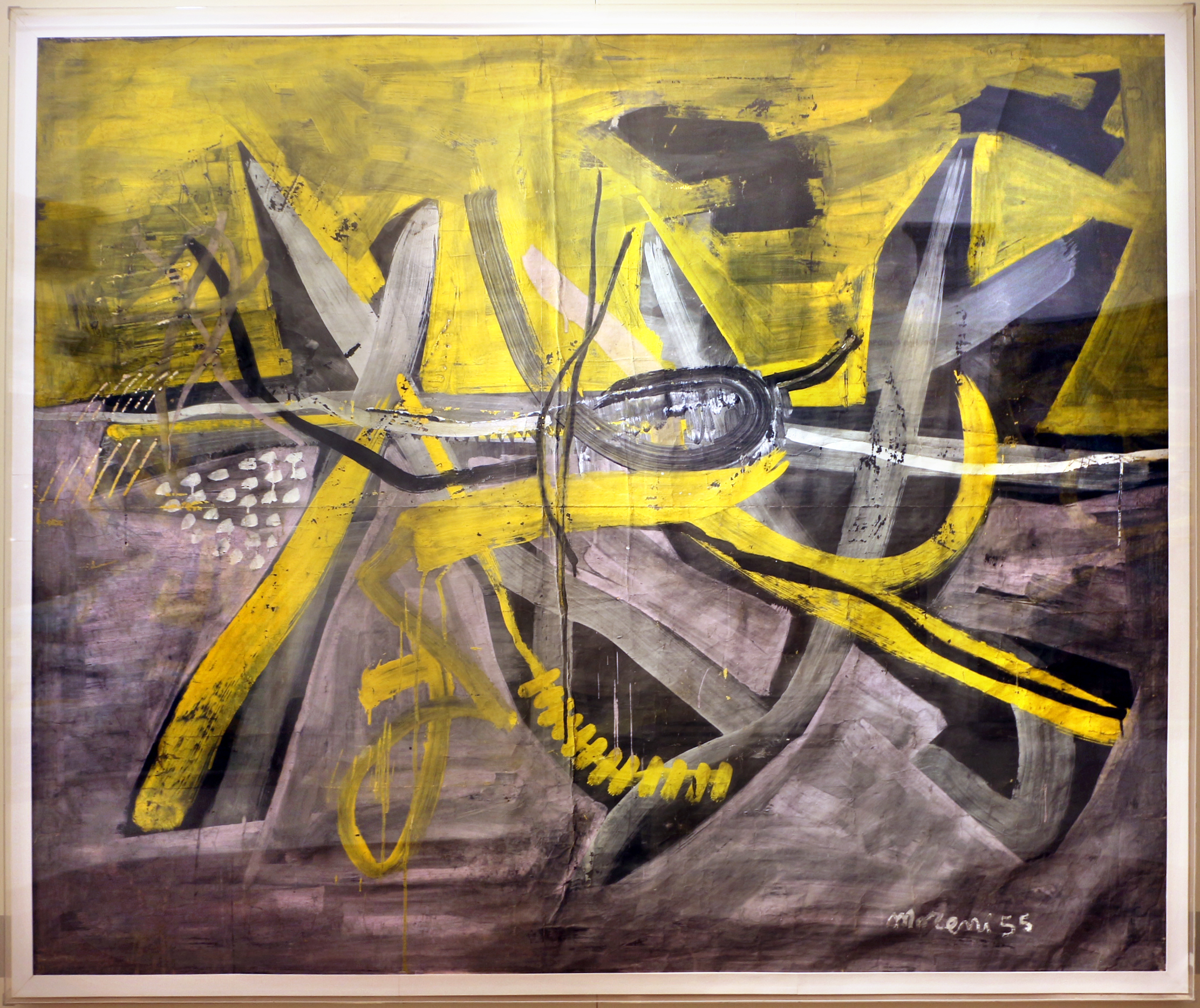 Collezione Mosaici Moderni - NB: Museum explicitly authorized the upload of its contemporary art collection for WLM 2016 (for further info ask WLM Italy organizators). This is a photo of a monument which is part of cultural heritage of Italy.